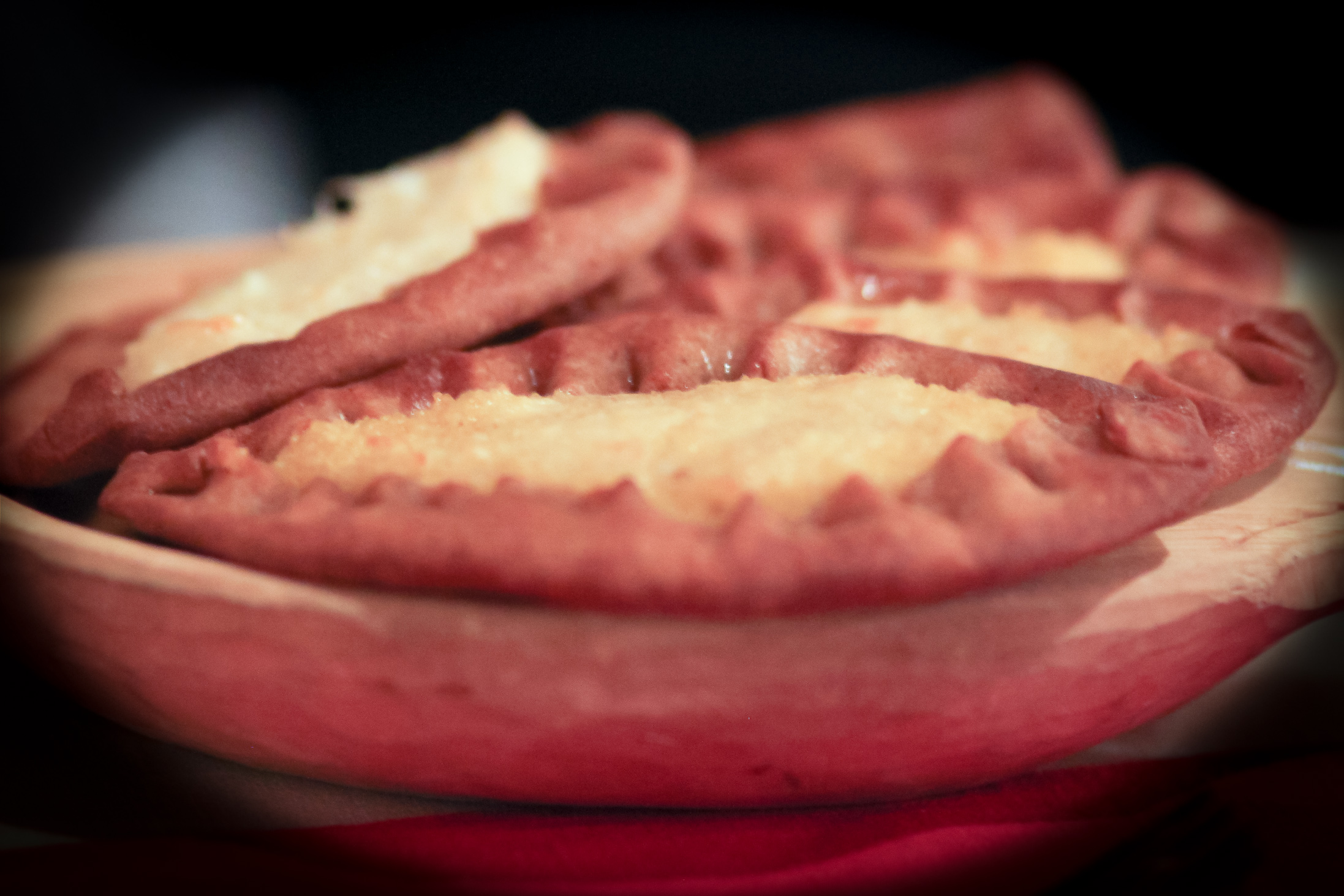 Калитки